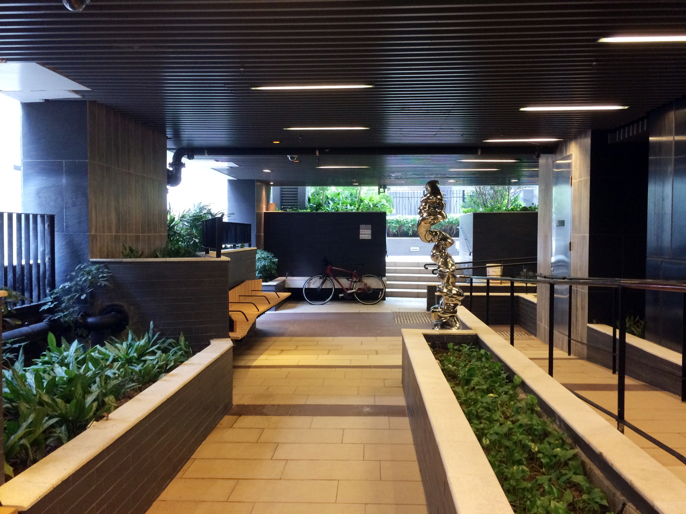 CentrePoint Public open space